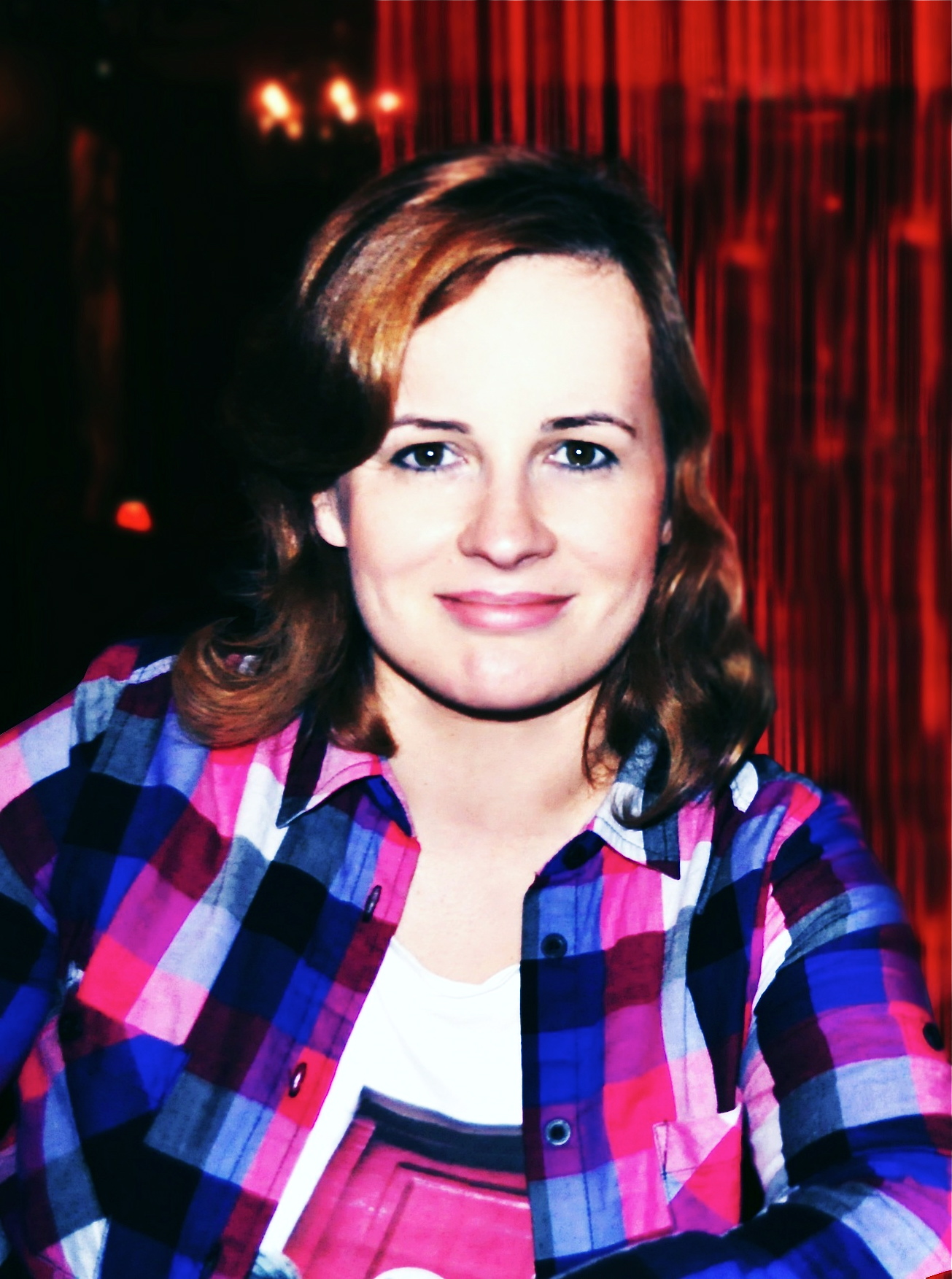 Aktorka